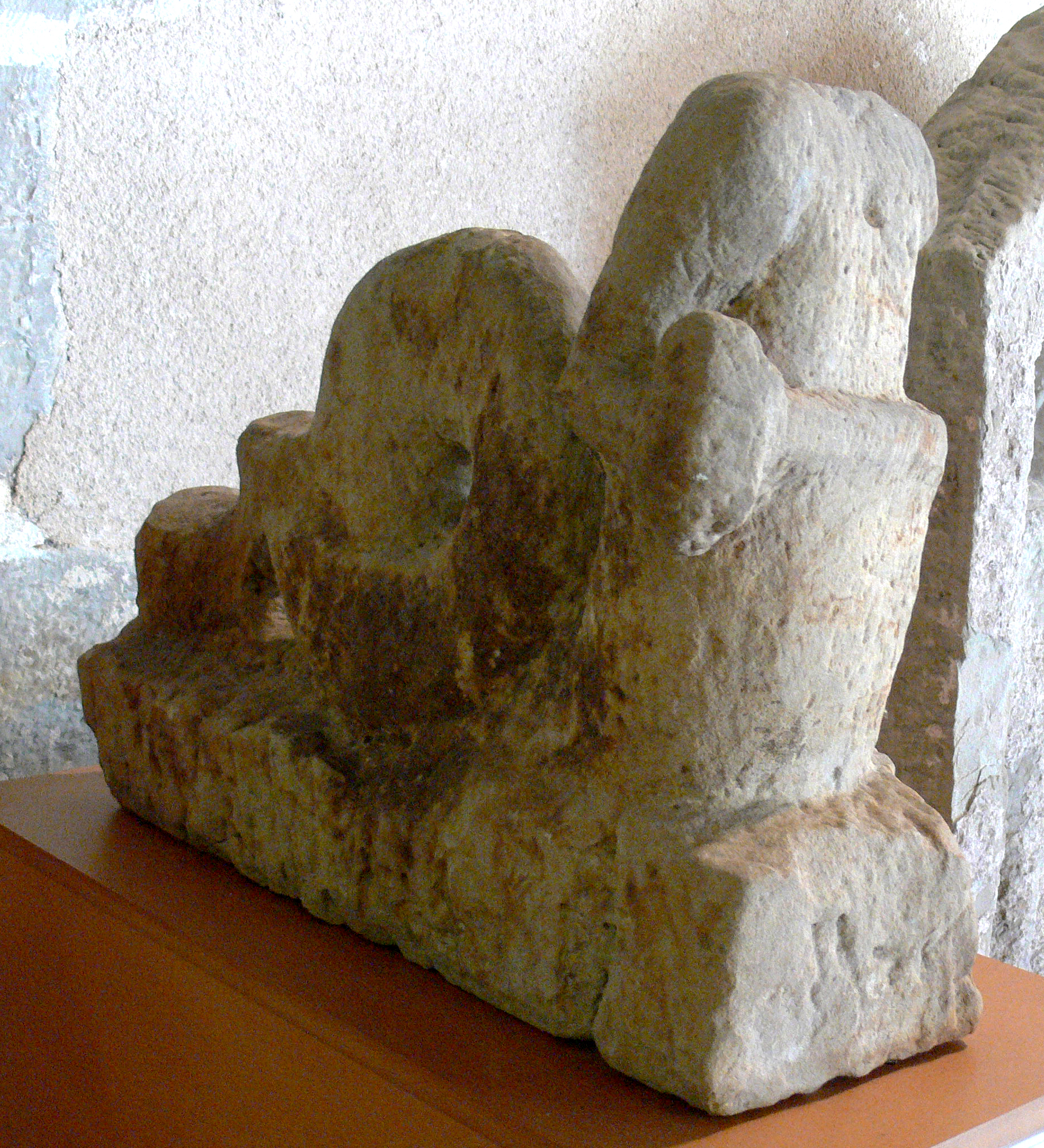 Divinité marine trouvée à Corre (Haute-Saône). Epoque gallo-romaine. Grès. Vesoul, musée Georges-Garret. Dépôt de la Salsa, 1963.